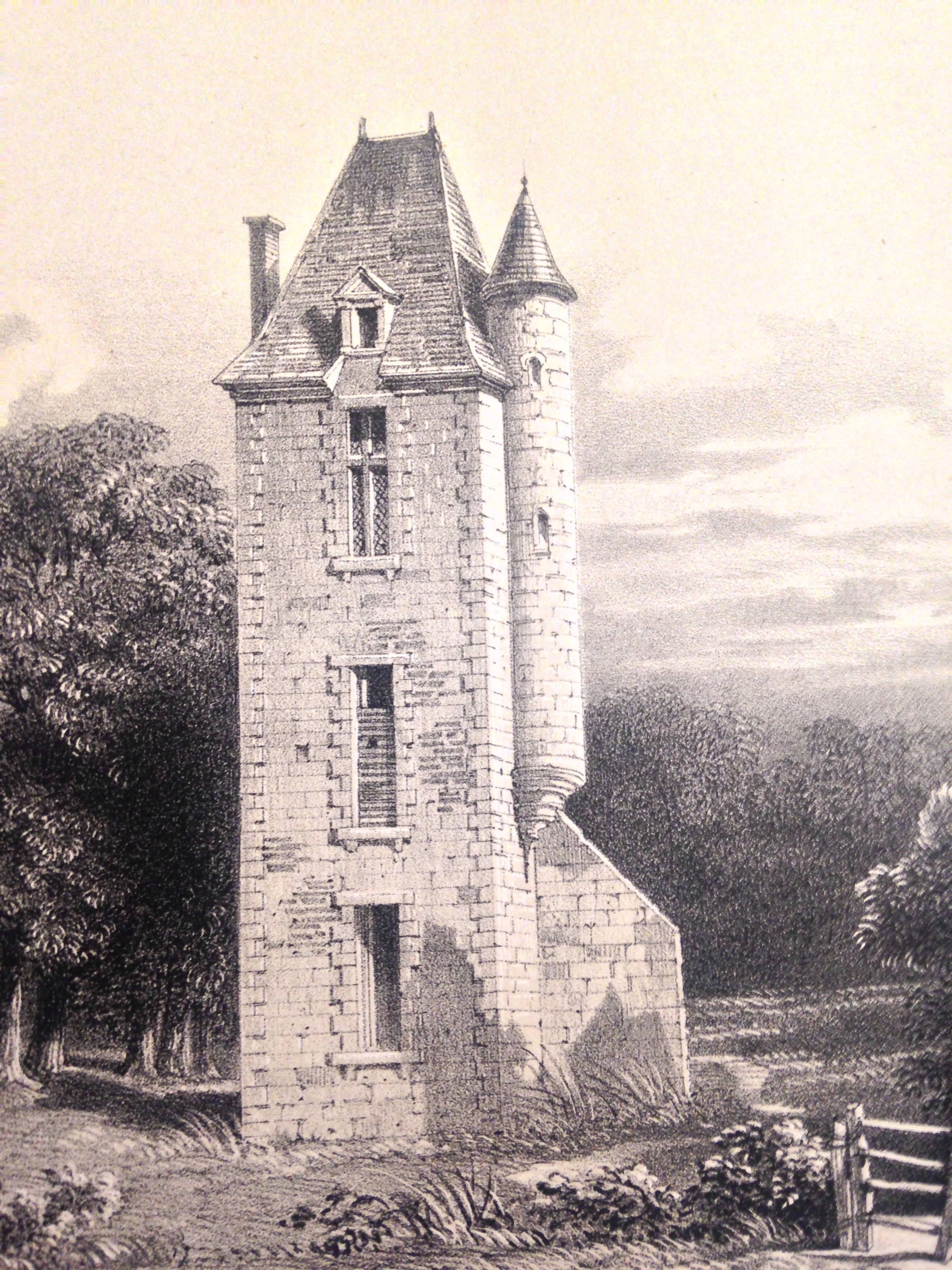 Le château de Bonchamps a été incendié en 1793. T. Drake le dessine pour "L'Album vendéen" (1856)